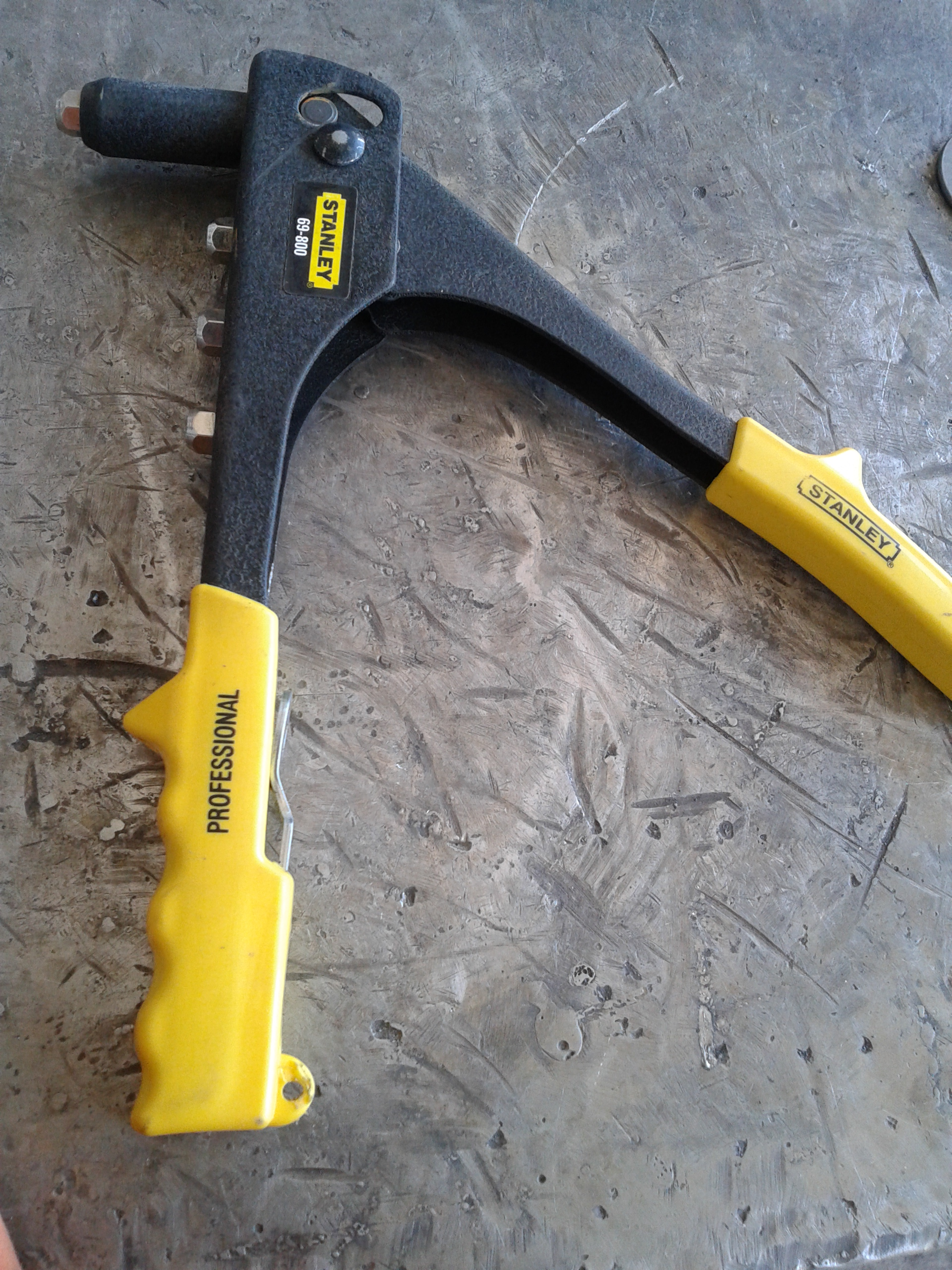 Remachadora Stanley